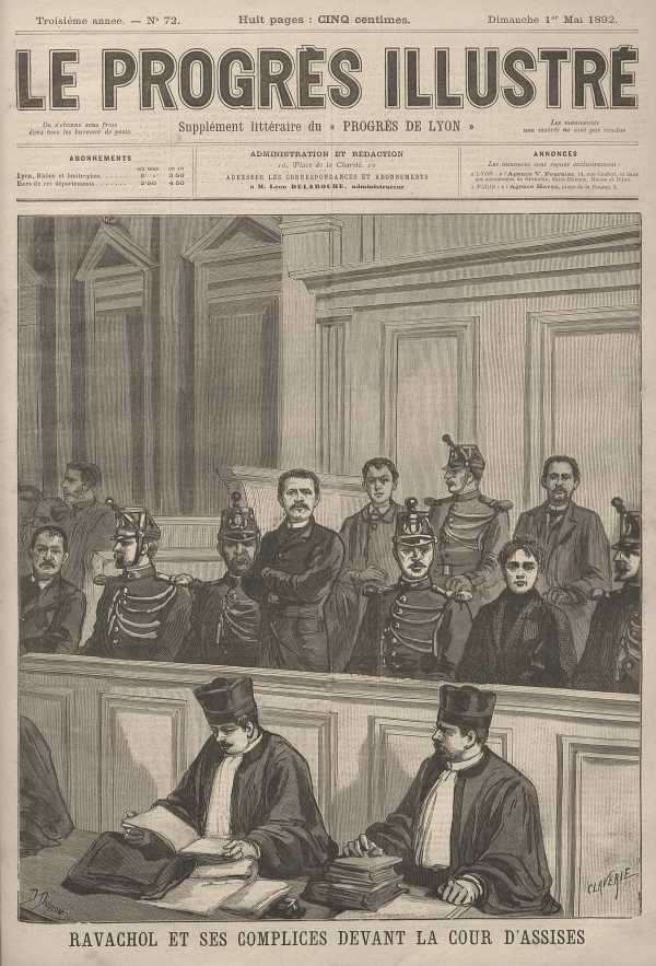 Ravachol et ses complices devant la cour d'Assisses de la Loire, à Montbrison.